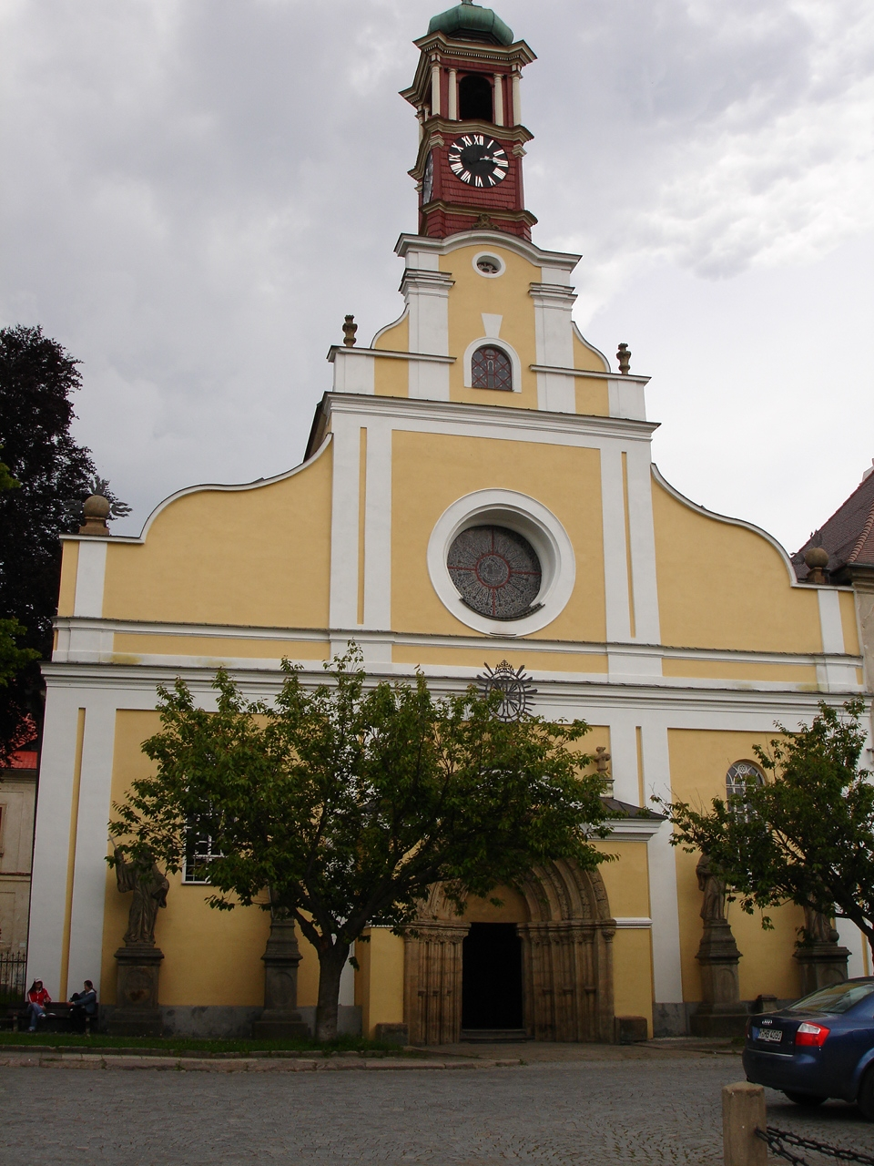 Průčelí kostela Nanebevzetí Panny Marie při bývalém klášteře v Polici nad Metují.